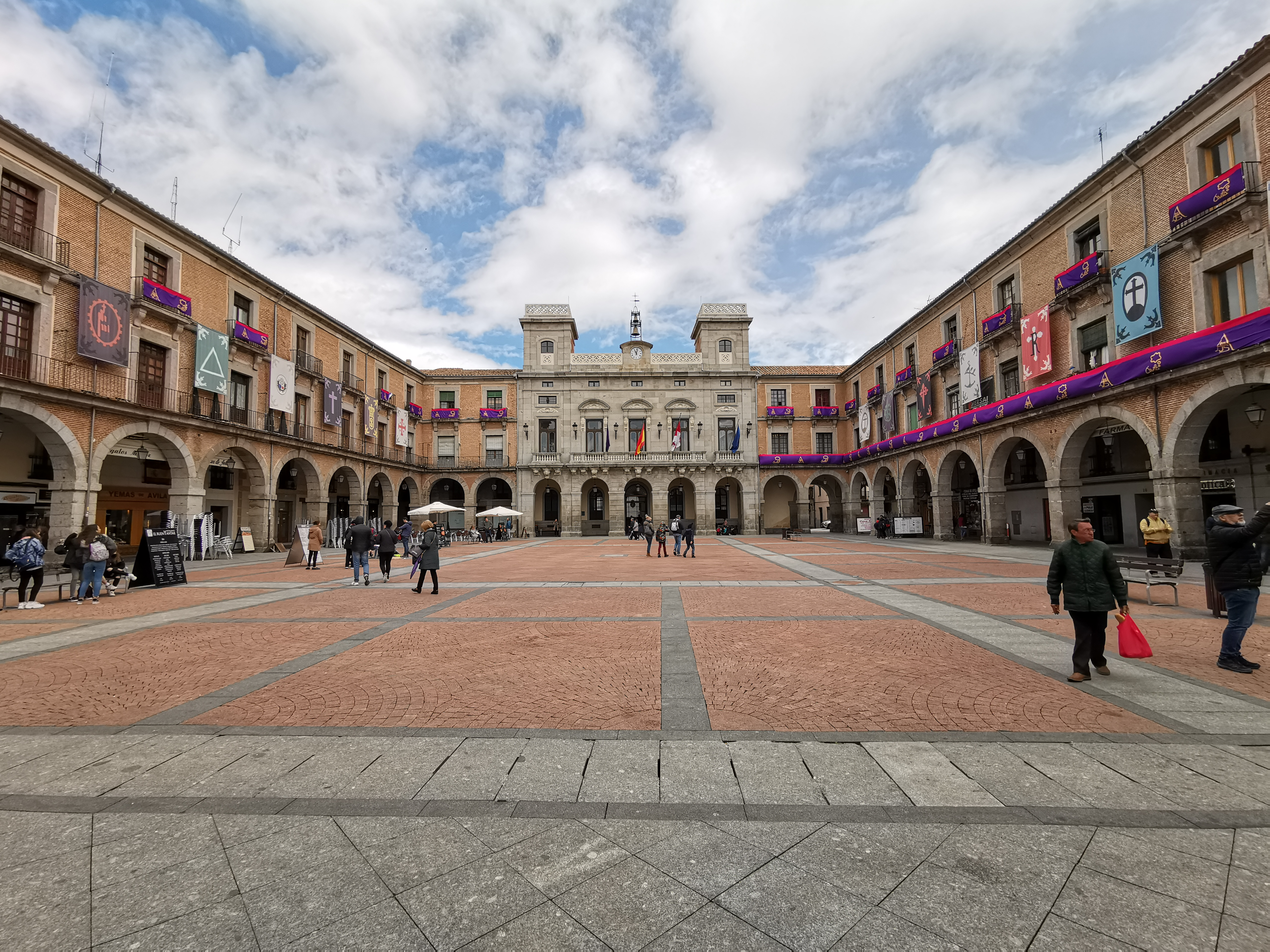 Plaza del Mercado Chico, Ávila.